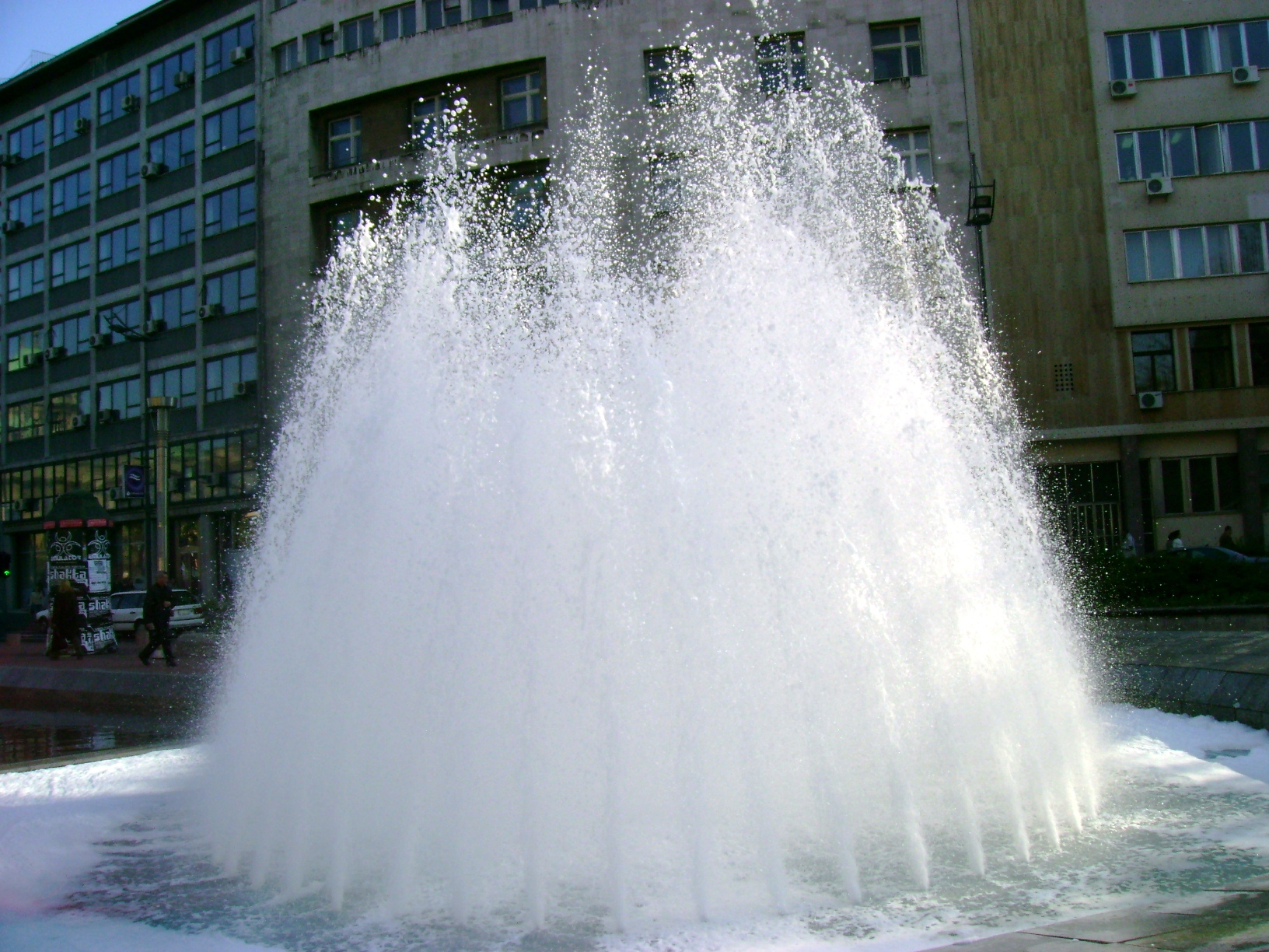 Fontana kod Doma Sindikata